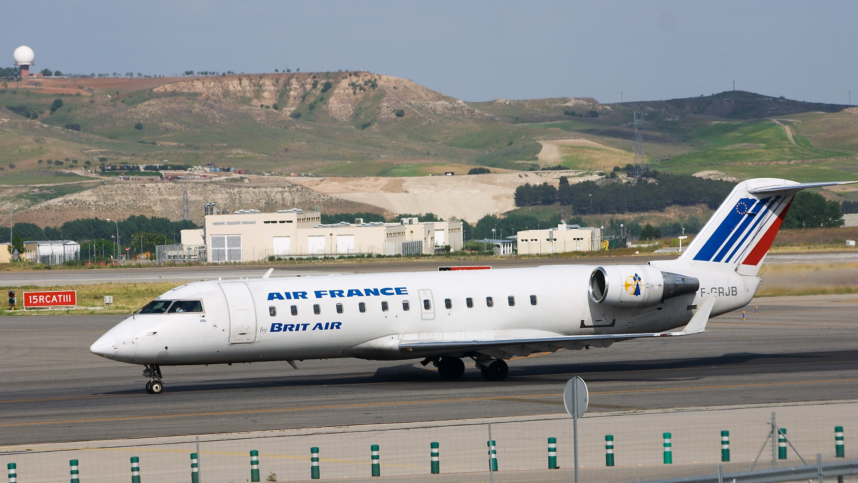 Canadair CRJ-100ER de Air France rodando para despegar del aeropuerto de Madrid Barajas.